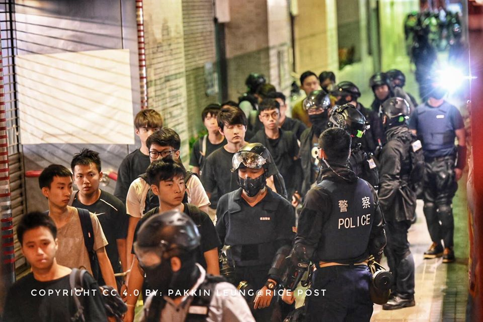 1102 修頓球場